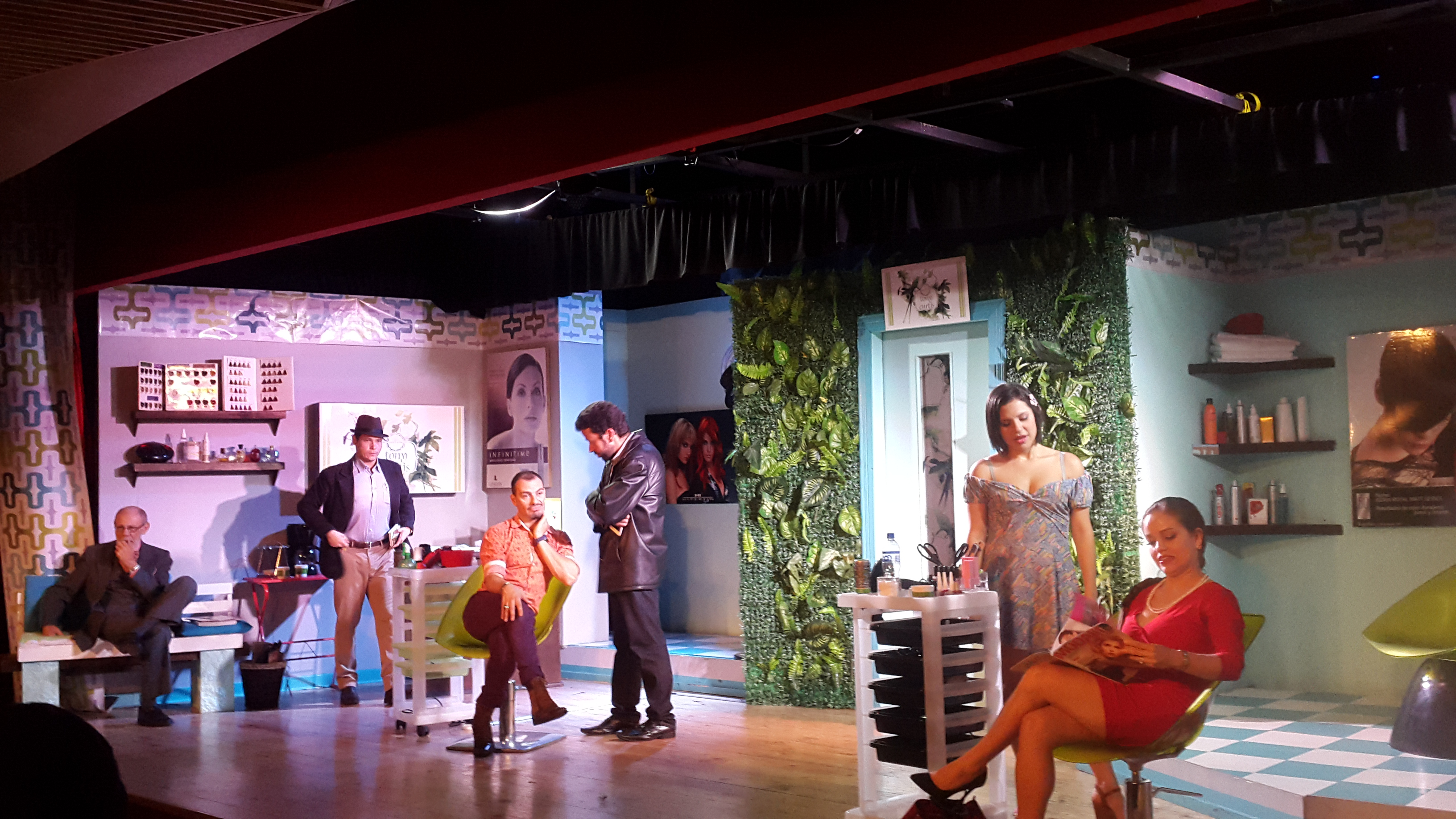 Obra de teatro "Crimen, shampoo y tijeras", en el Teatro El Triciclo, Escazú, Costa Rica.